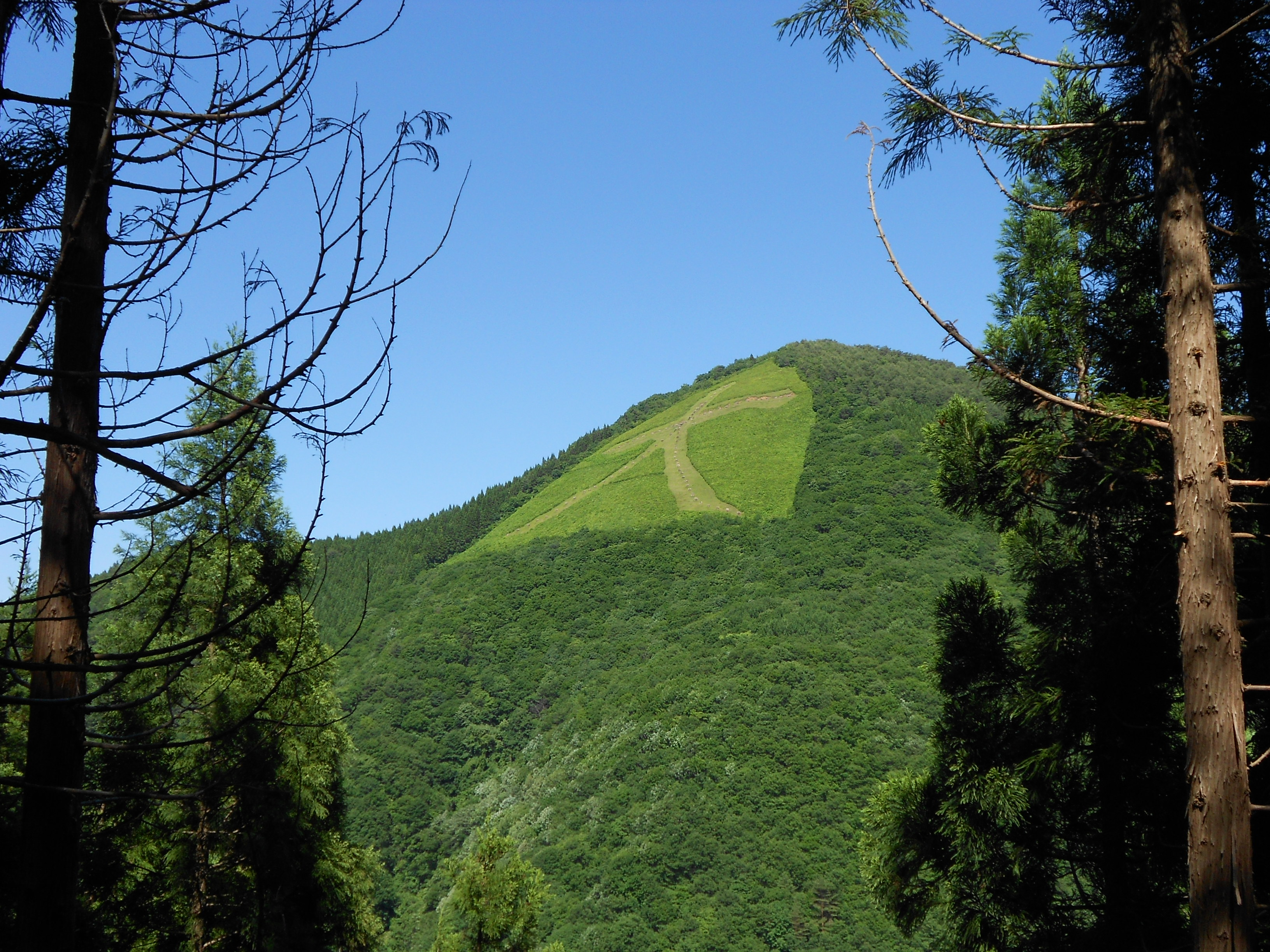 鳳凰山（秋田県大館市）